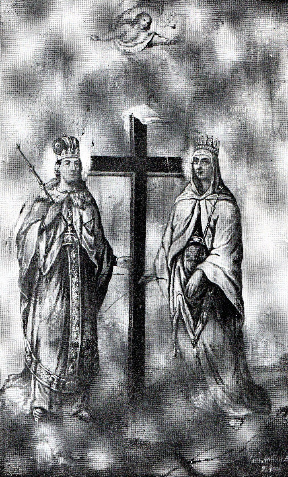 Icoana pictata de Nicolae Grigorescu cu Sfinții Împărați Constantin și Elena. Icoana se află și astăzi la biserica ortodoxă de la Băicoi